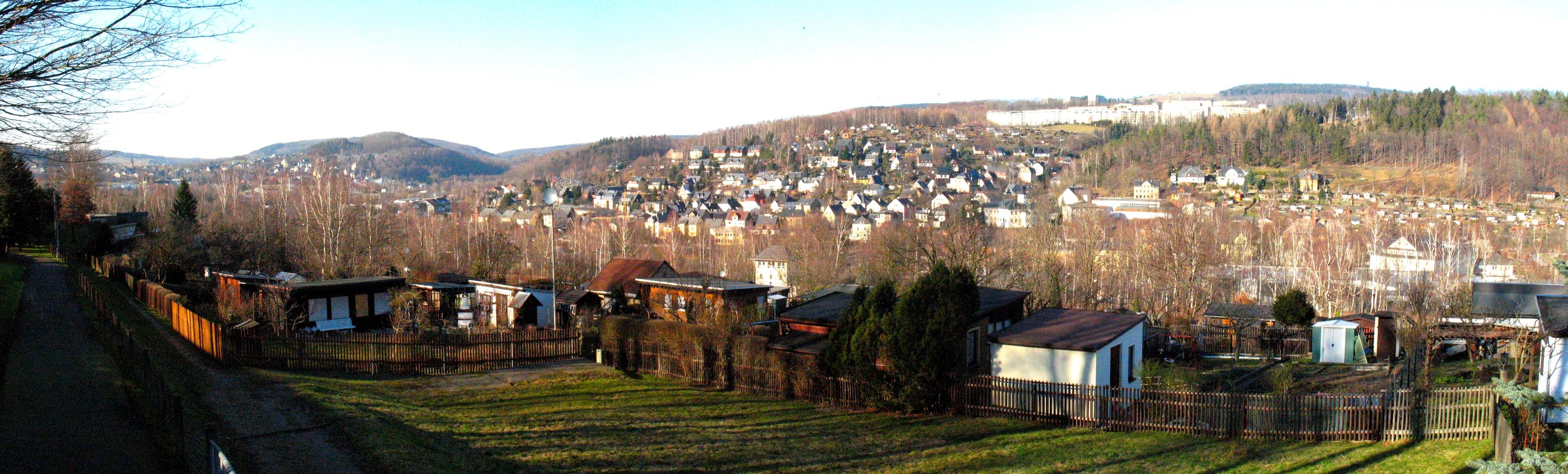 Panorama des Schwarzenberger Ortsteils Sachsenfeld aus Richtung des Zentralfriedhofs